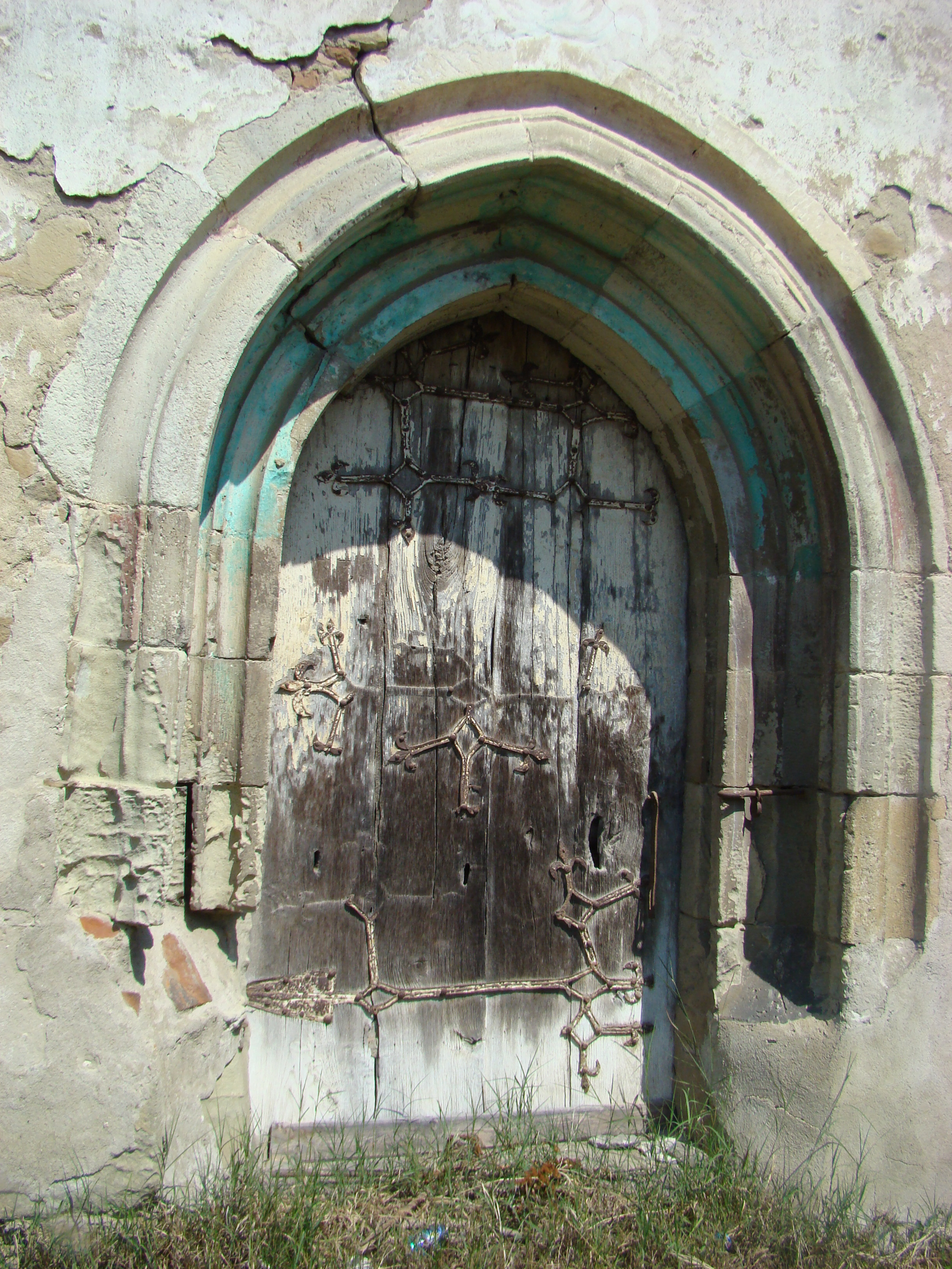 Biserica evanghelică, sat Șmig; comuna Alma